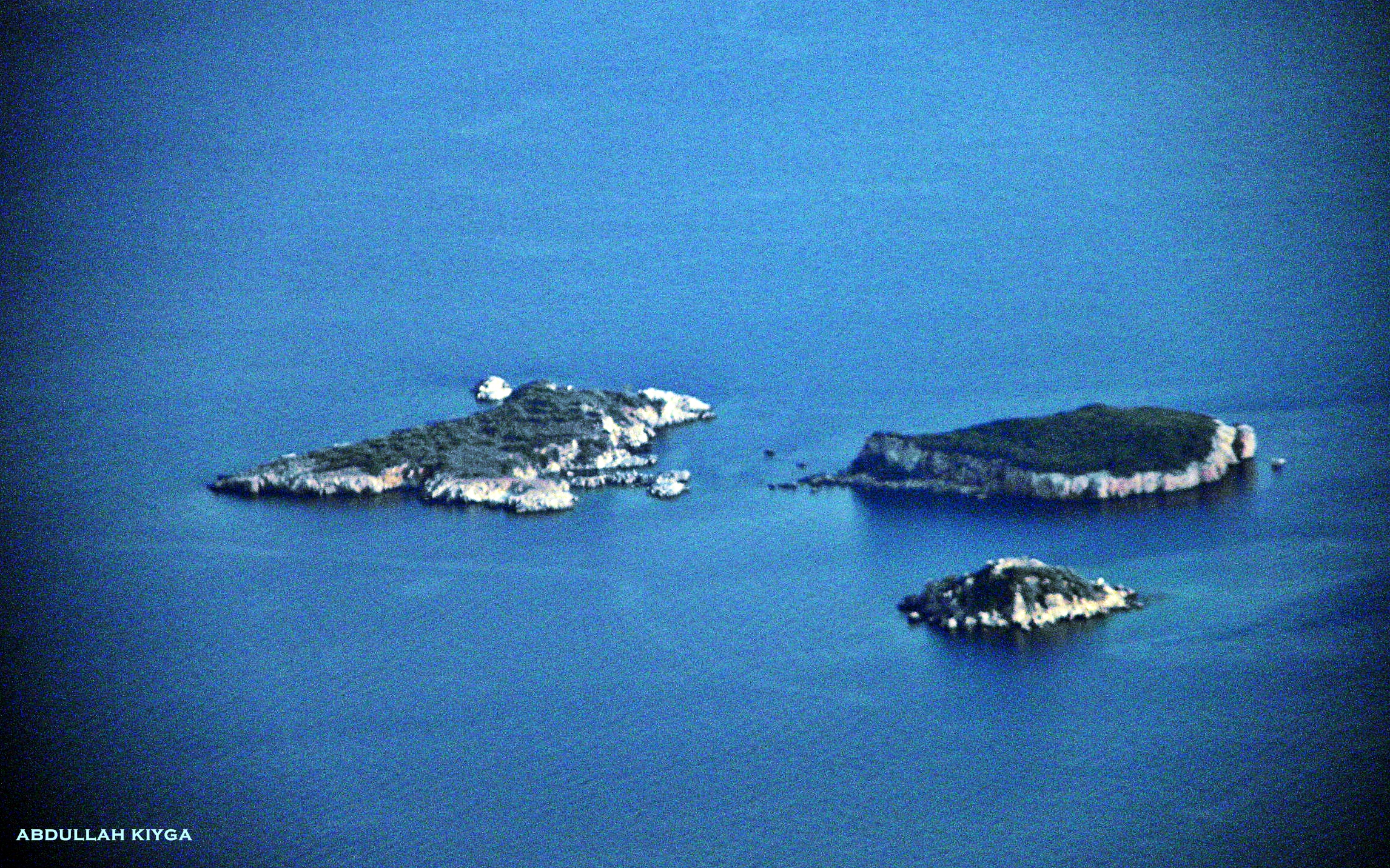 3 острова adacıklar *©Abdullah Kiyga